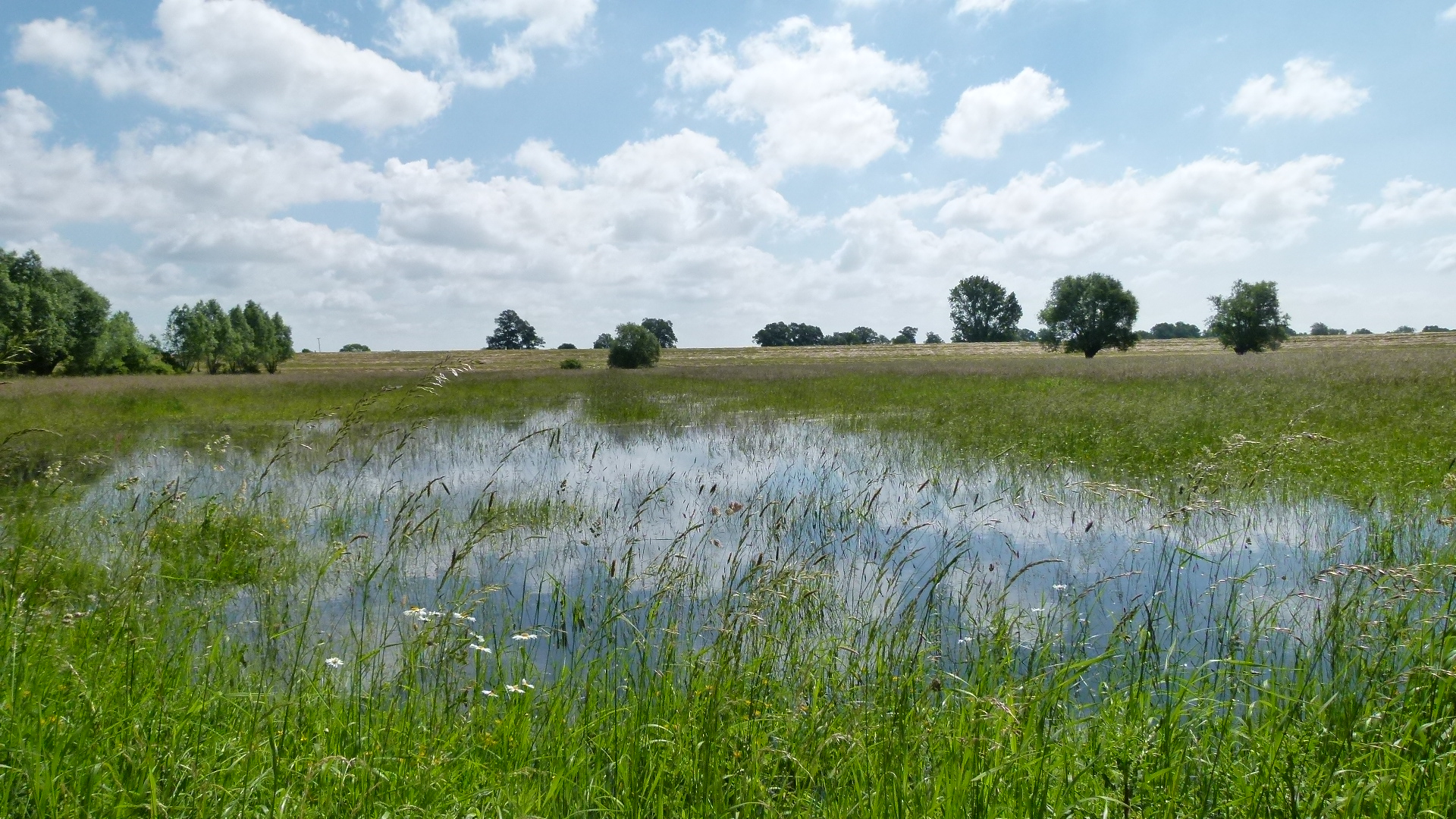 Sommerhochwasser im Naturschutzgebiet „Aland-Elbe-Niederung“ (NSG Nr. 388), Sachsen-Anhalt